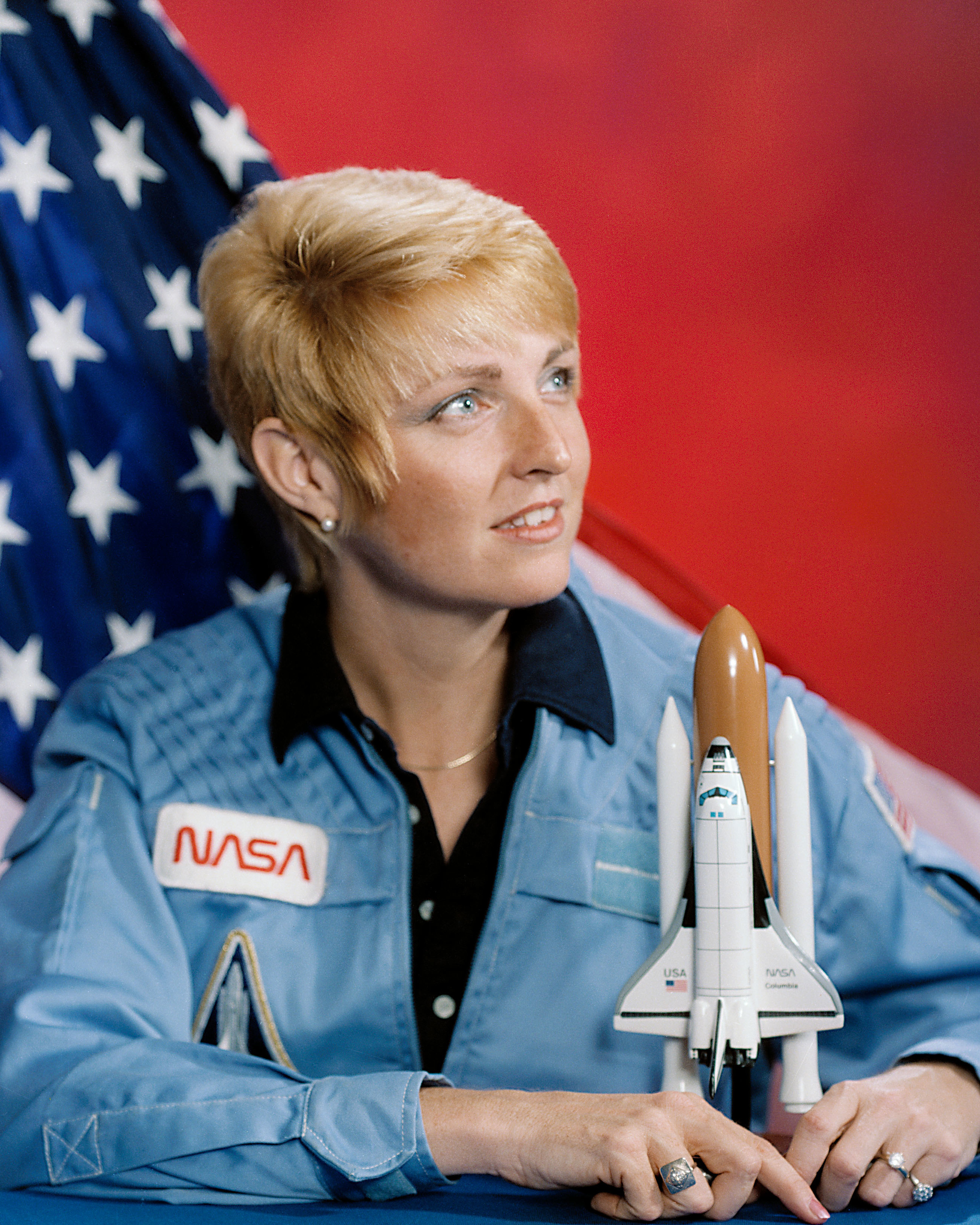 Millie Hughes-Fulford